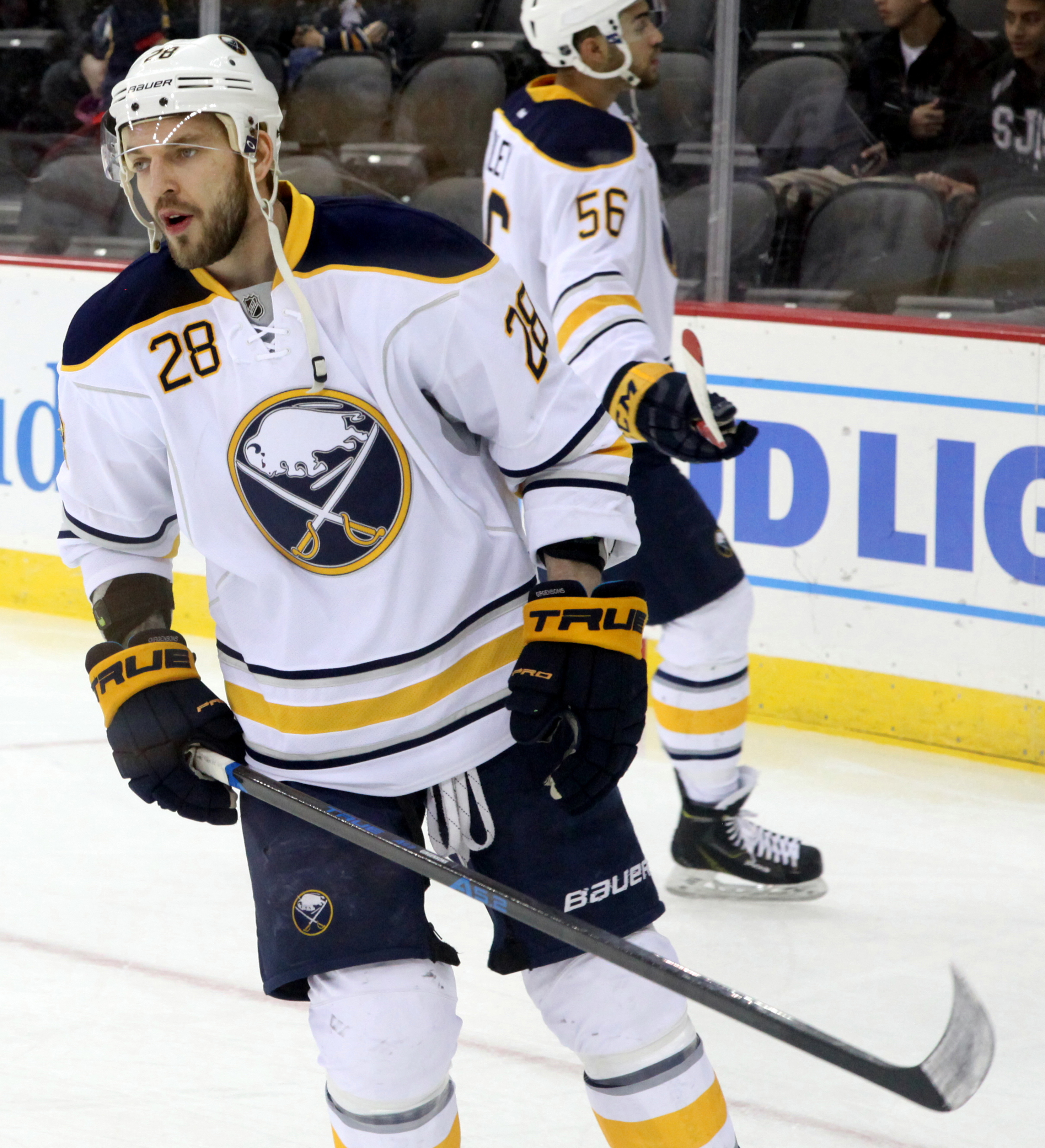 Zemgus Girgensons in April 2016.